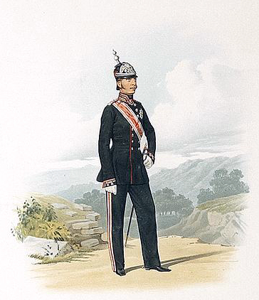 Медик состоящий в чине Действительного Статского Советника при Гвардейских войсках и при Военно-Учебных заведениях. (В парадной форме.) 15 марта 1857.